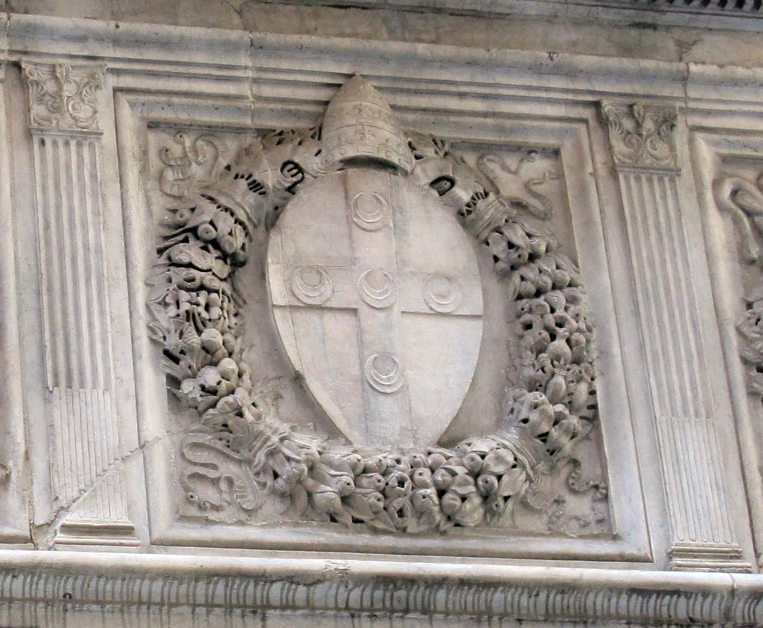 Banchi di Sotto, Siena